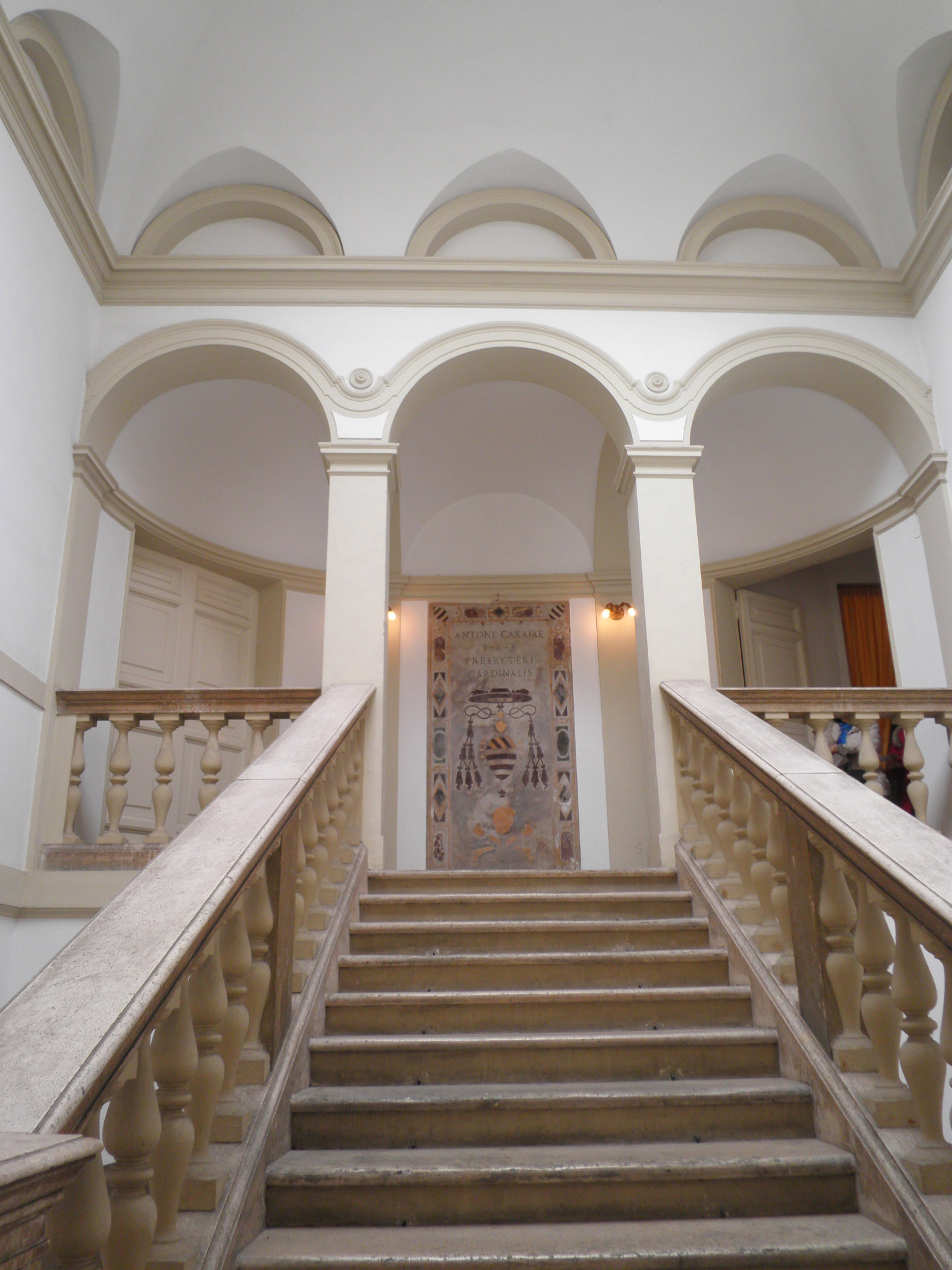 Roma, san Silvestro al Quirinale: ingresso rialzato